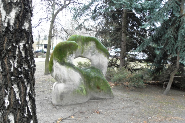 Warszawa, ul. Pięciolinii 5